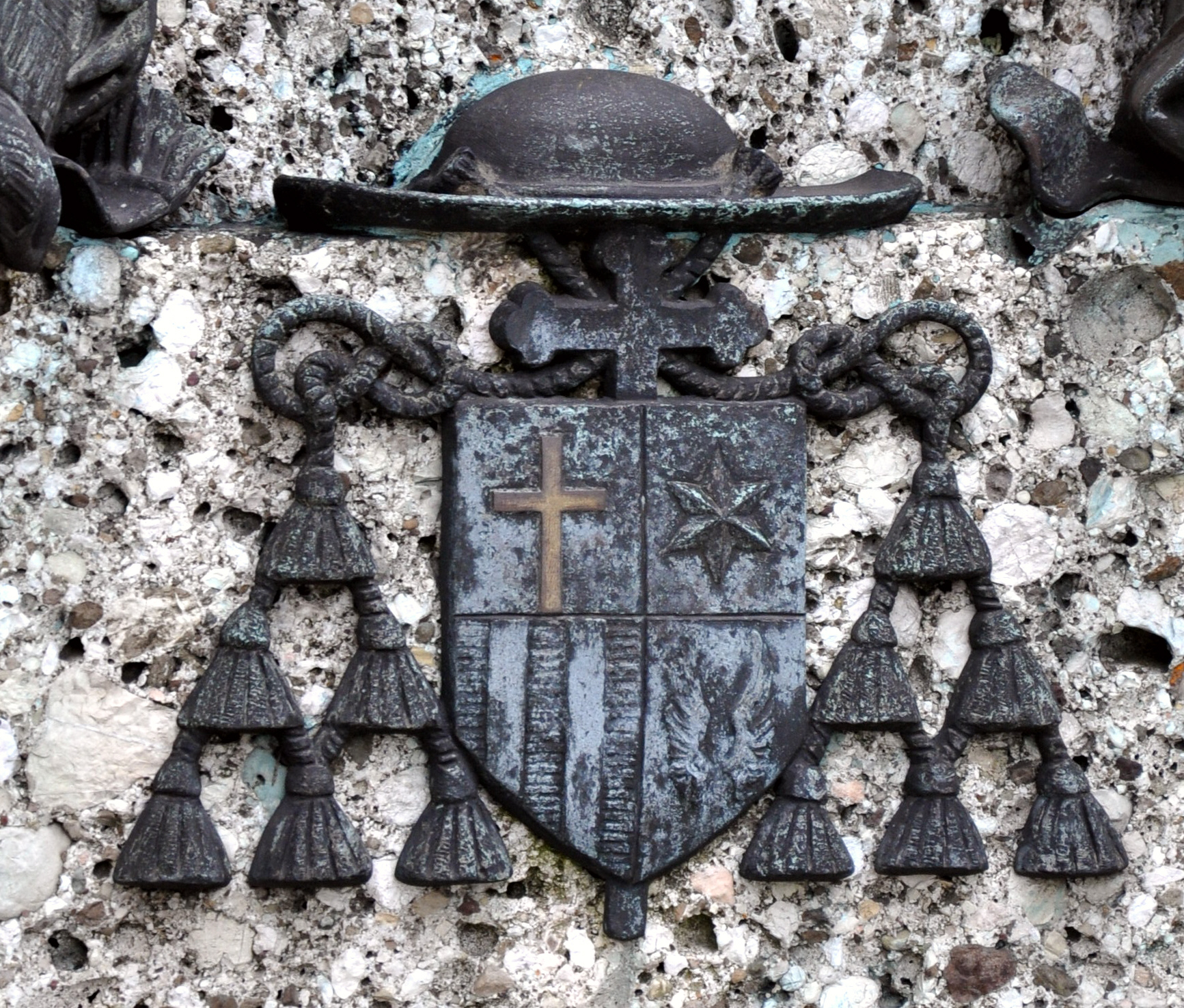 Linz, Denkmal für Bischof Rudolph Hittmair vor der Kirche der Barmherzigen Brüder, Detail: Wappen